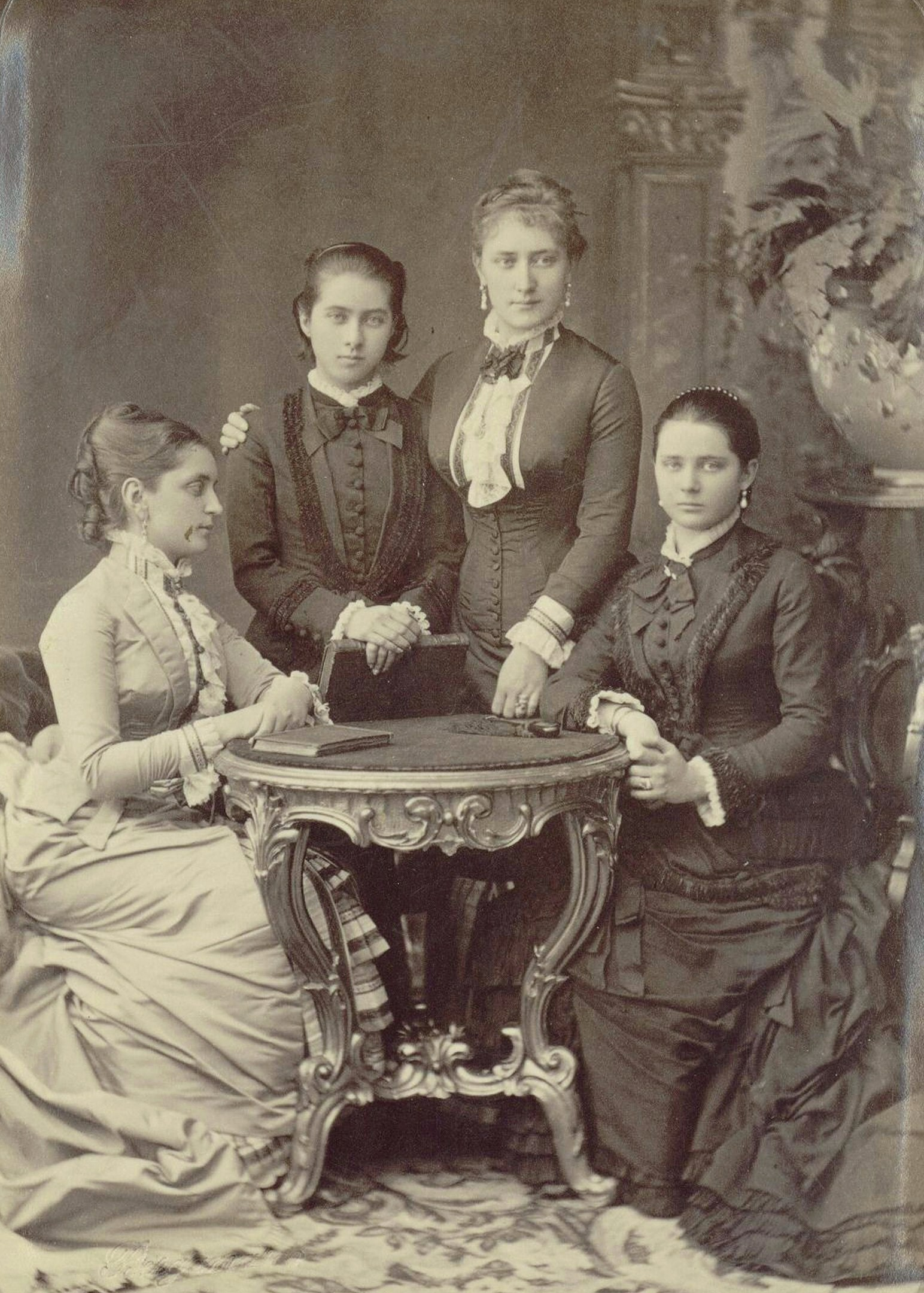 Княгиня Татьяна Александровна Юсупова (1829—1879) с дочерьми Зинаидой (1861—1939) и Татьяной (1866—1888).